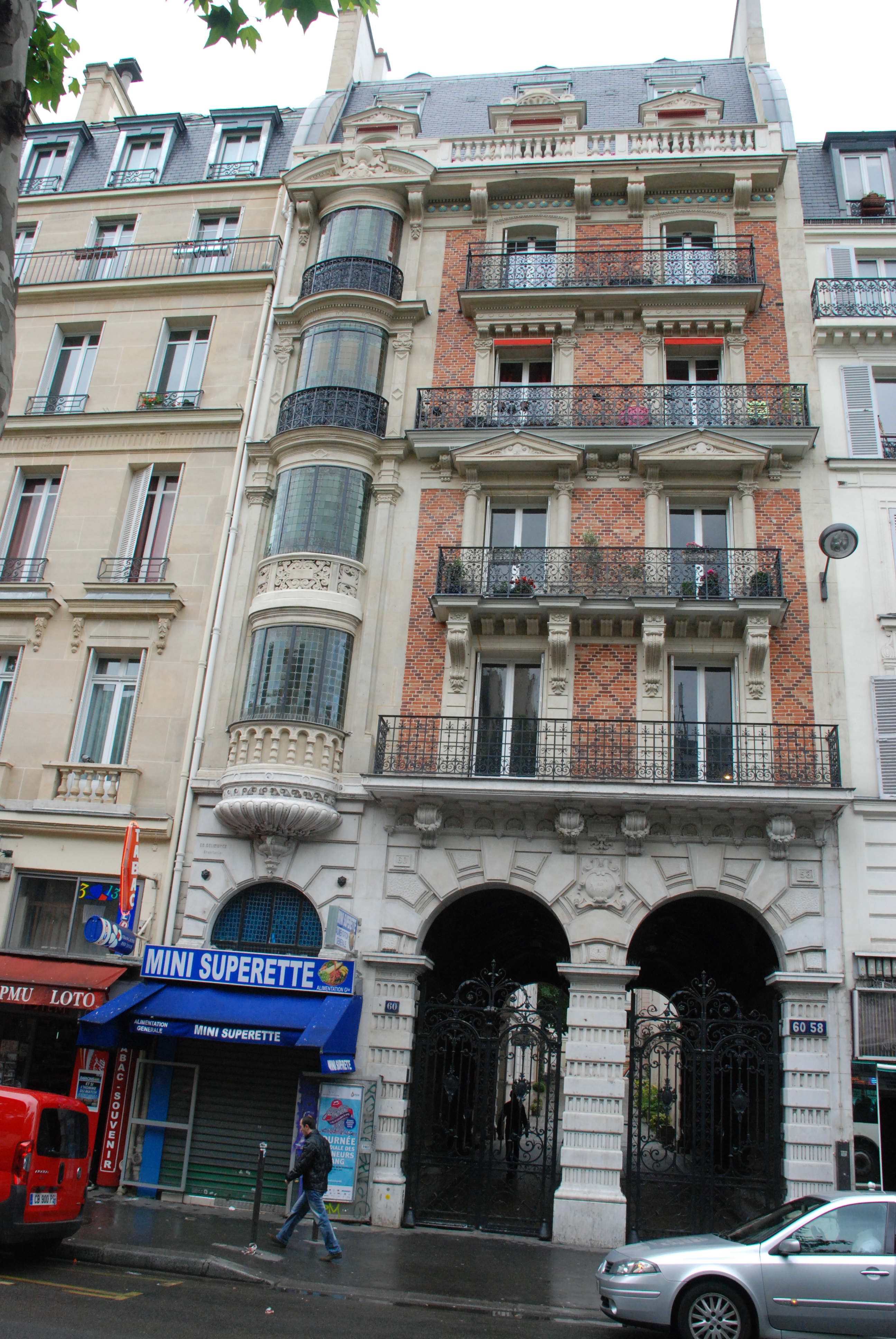 Domicile et atelier de Guillonnet à partir de 1895